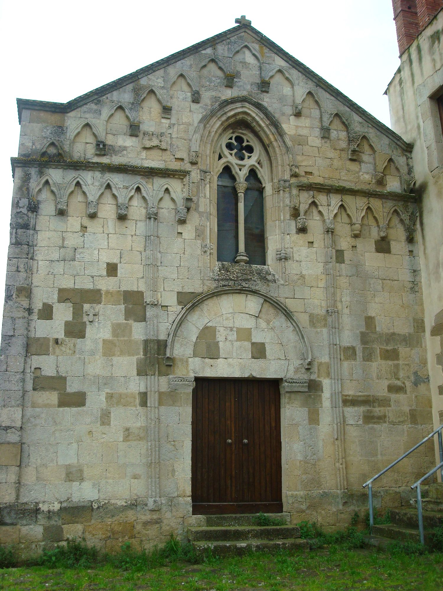 Facciata della chiesa della Madonna del Carmine a Mogoro.